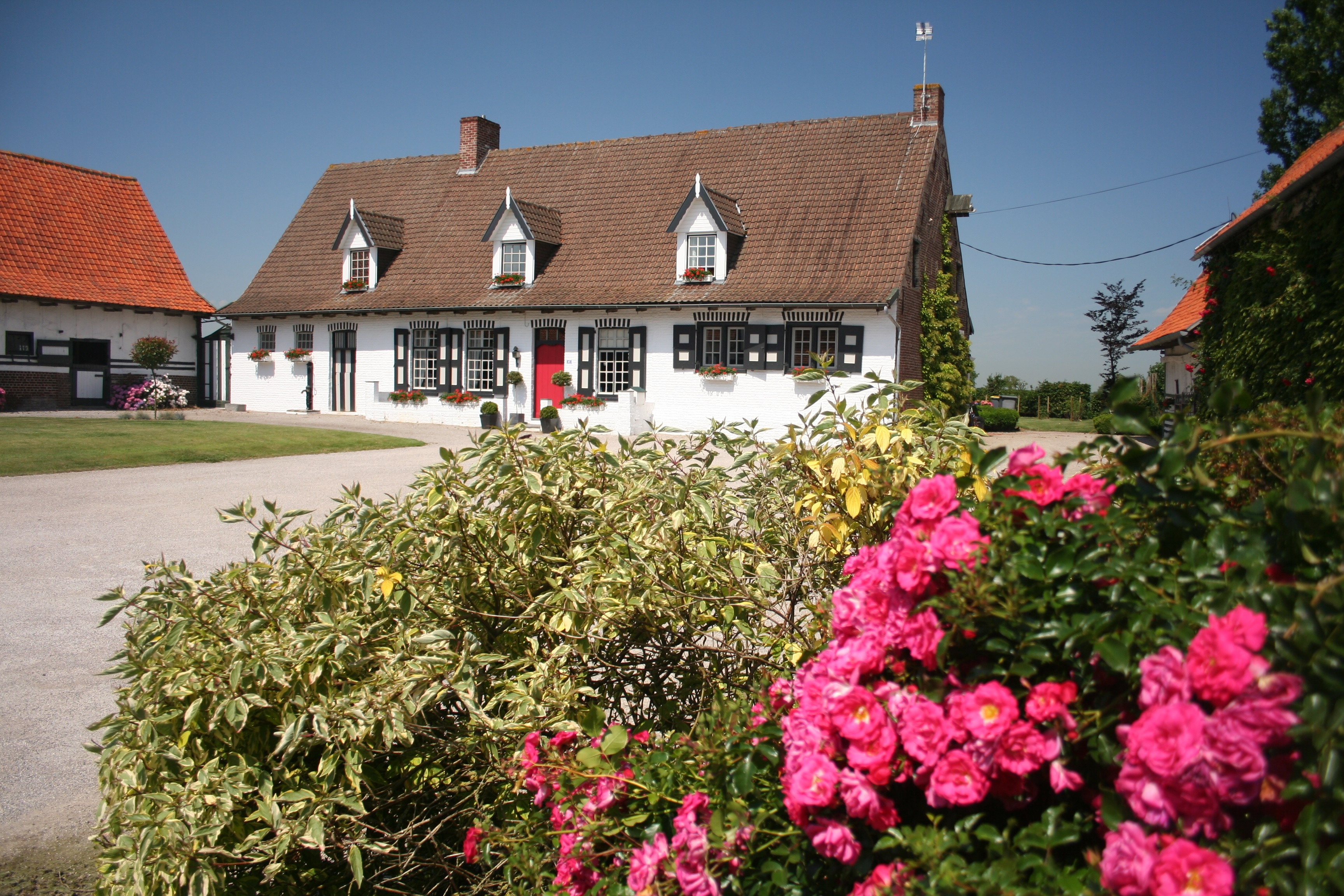 FLANDRE. Une hofstède traditionnelle à Ledringhem